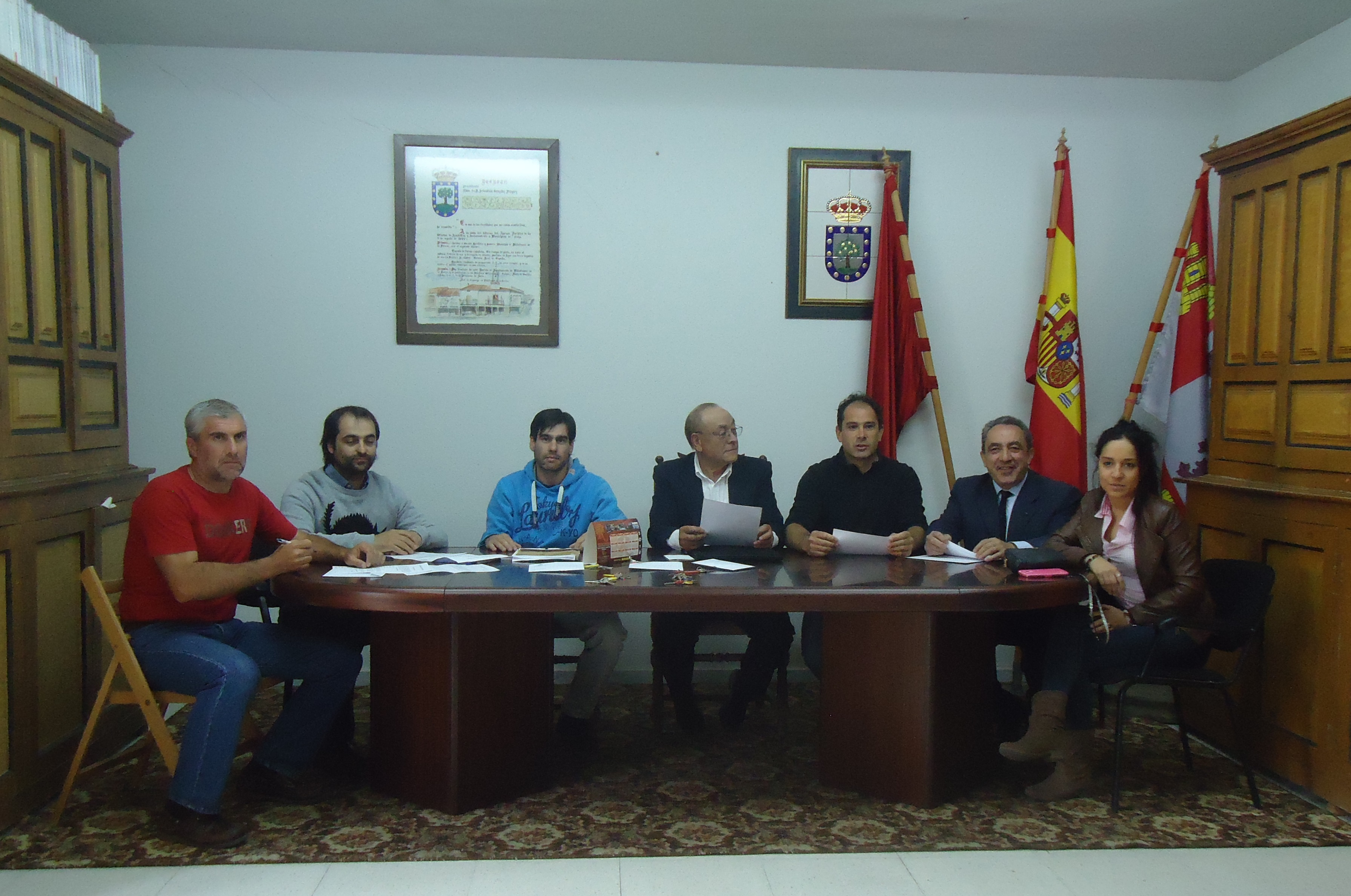 La nueva corporación municipal de Villafranca de la Sierra (Ávila; España): 4 concejales de Ciudadanos y 1 concejal del PP. 13 de junio de 2015. De izquierda a derecha: Francisco López Pérez (C's) / Alcalde; Florentino Adalia López (C's); José María Sánchez Romero (C's); Esteban Romero Martín (C's); Francisco Javier Herrera Izquierdo (PP)